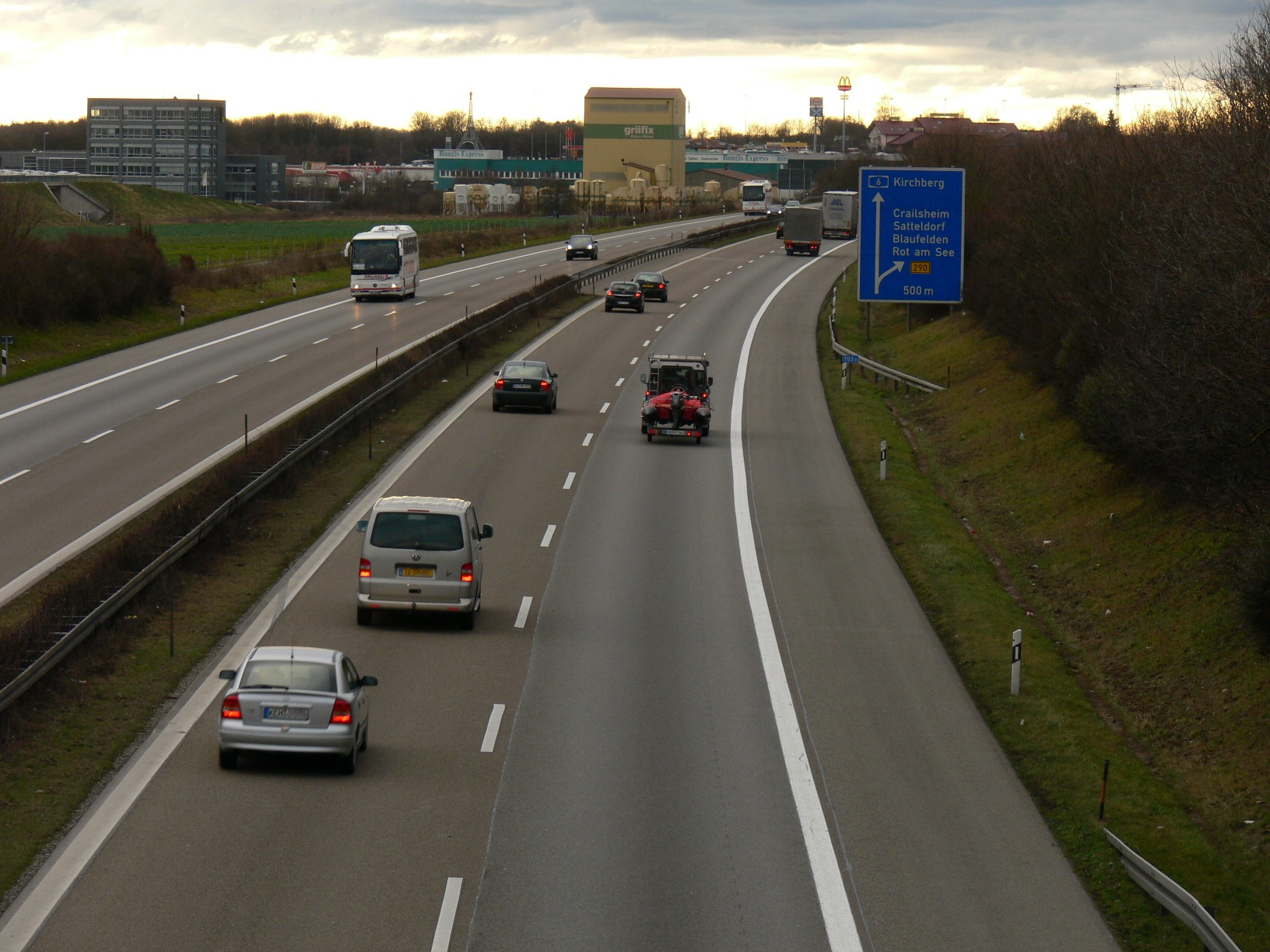 Bundesautobahn 6 near Exit 46 (westbound)